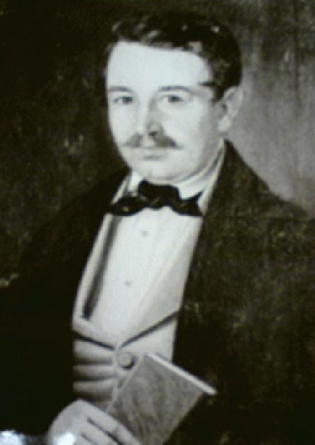 Josef Věnceslav Soukup (1819-1882), český učitel, hudební skladatel, malíř a odborný publicista